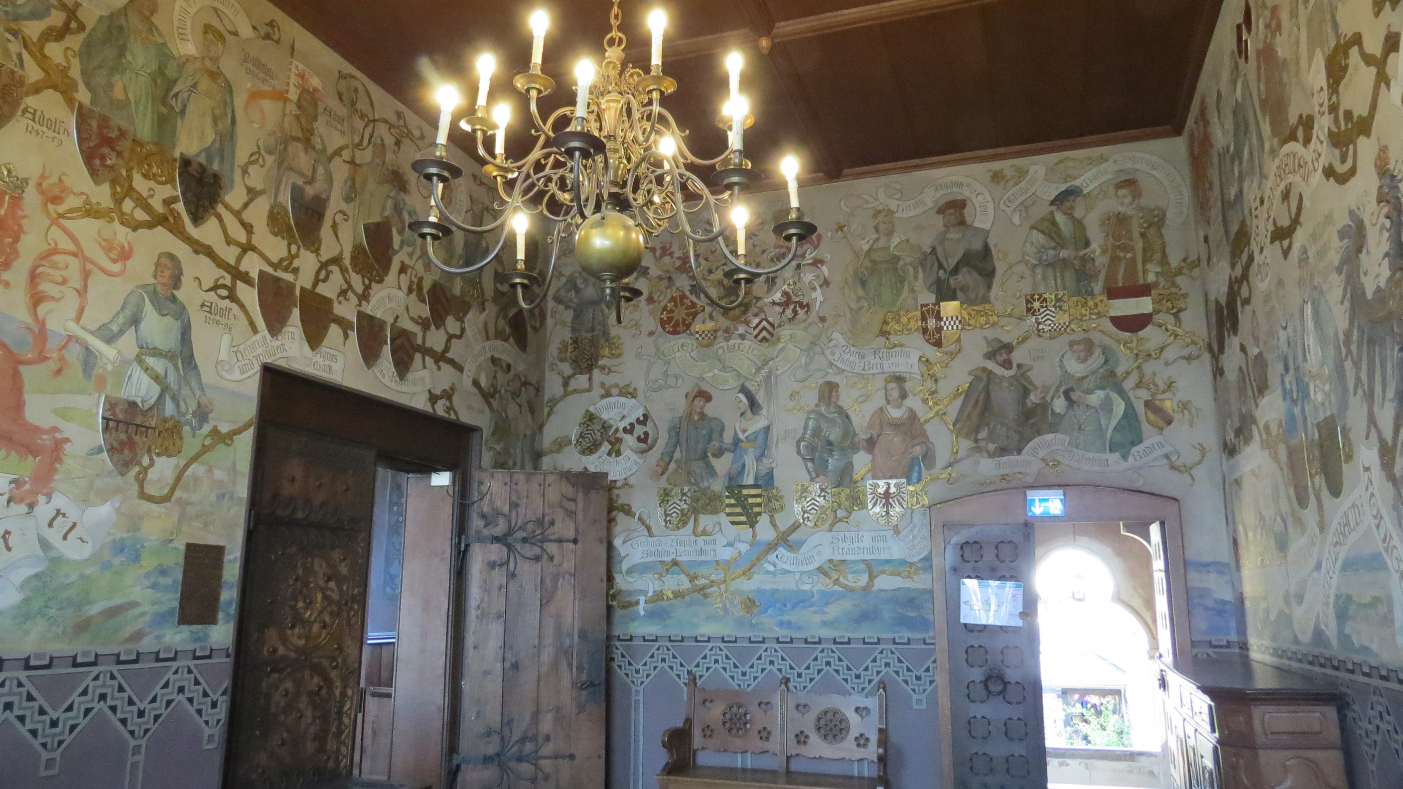 Der Ahnensaal von Schloss Burg in Solingen. Zwischen 1896 und 1908 unterstützte Schill – zusammen mit dem Provinzialkonservator Paul Clemen, den Akademie-Professoren Eduard von Gebhardt und Peter Janssen d. Ä. sowie weiteren Künstlern – die Ausmalung des Rittersaals von Schloss Burg an der Wupper. Mit seinem Mitarbeiter Johannes Osten schuf er dabei in gotischer Ornamentik einen Stammbaum der bergischen Herrscher.